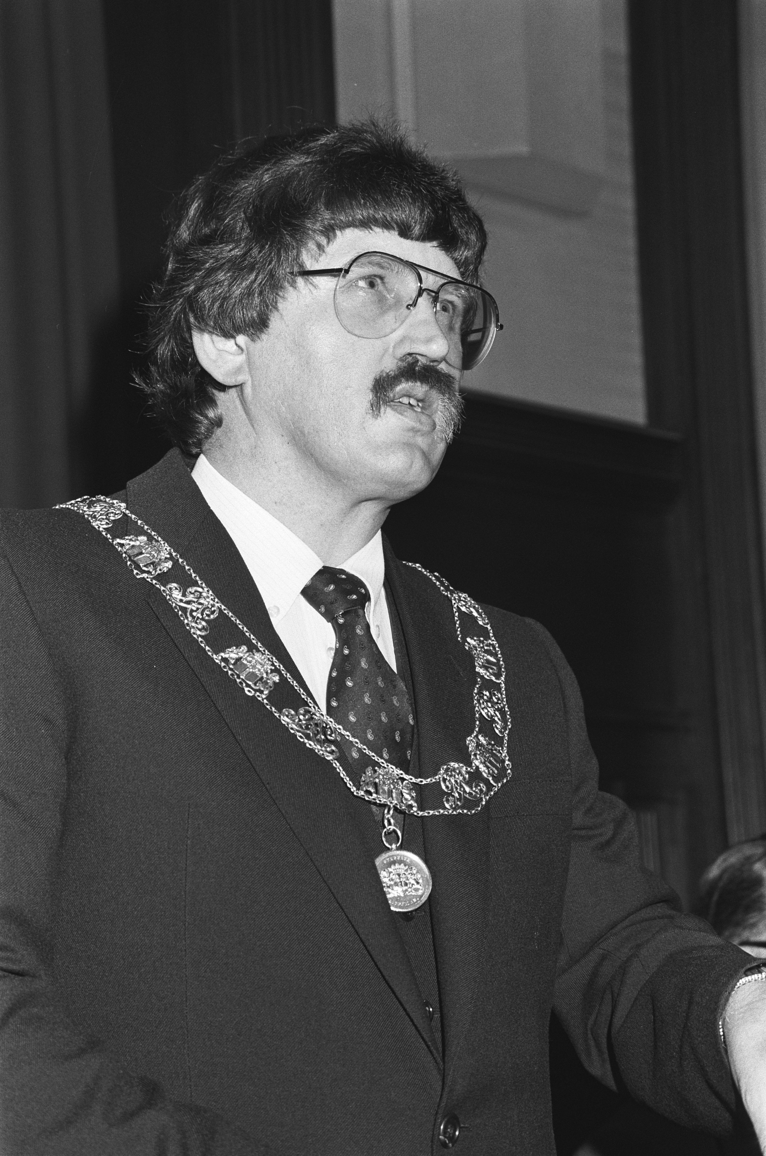 Collectie / Archief : Fotocollectie Anefo Reportage / Serie : [ onbekend ] Beschrijving : Dr. A. (Bram) Peper geïnstalleerd als burgemeester van Rotterdam en volgt minister Van der Louw op Datum : 18 maart 1982 Locatie : Rotterdam, Zuid-Holland Trefwoorden : burgemeesters, installaties, toespraken Persoonsnaam : Louw, André van der, Peper Fotograaf : Dijk, Hans van / Anefo Auteursrechthebbende : Nationaal Archief Materiaalsoort : Negatief (zwart/wit) Nummer archiefinventaris : bekijk toegang 2.24.01.05 Bestanddeelnummer : 932-0498